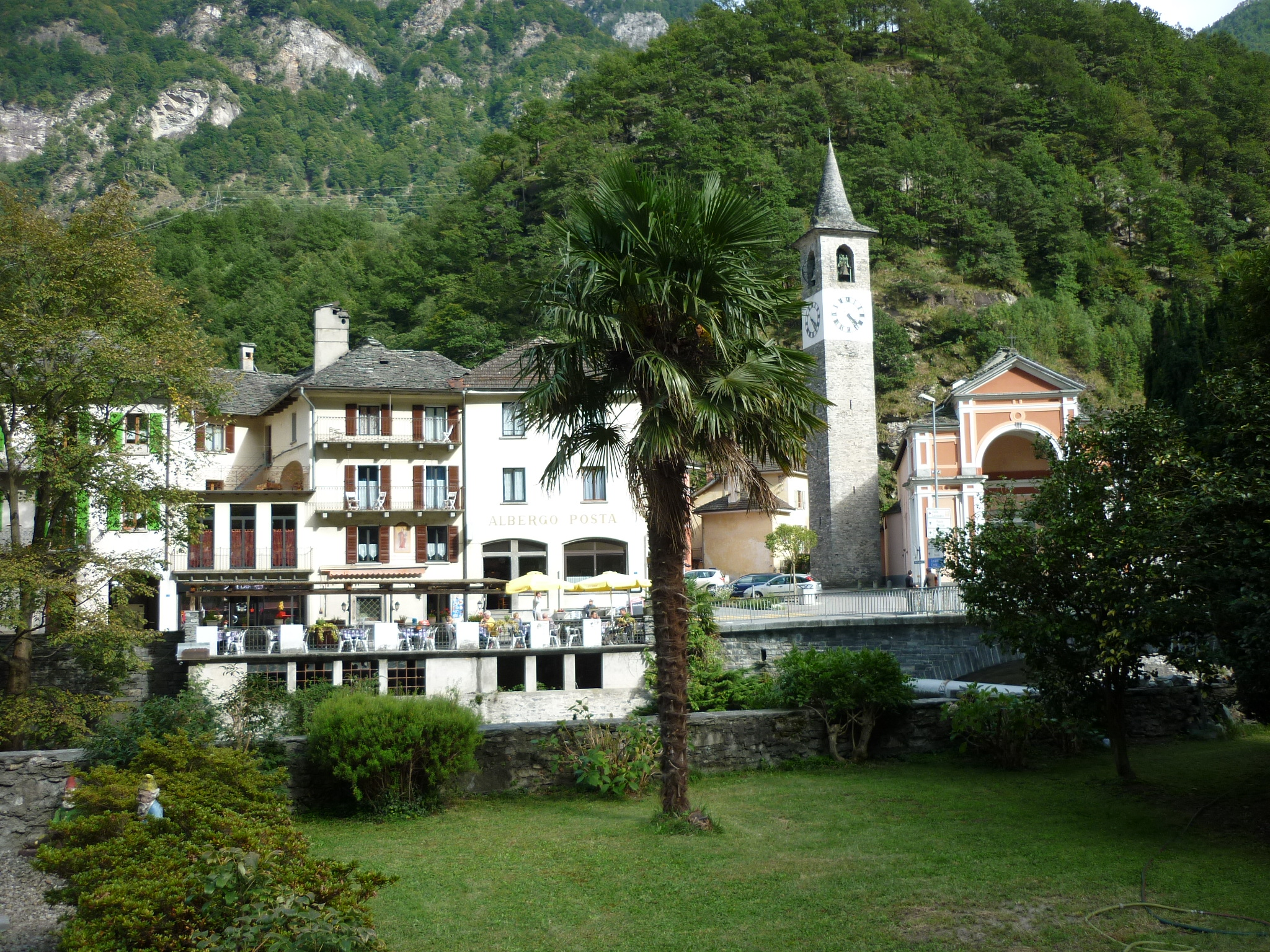 Bignasco, Tessin, Schweiz